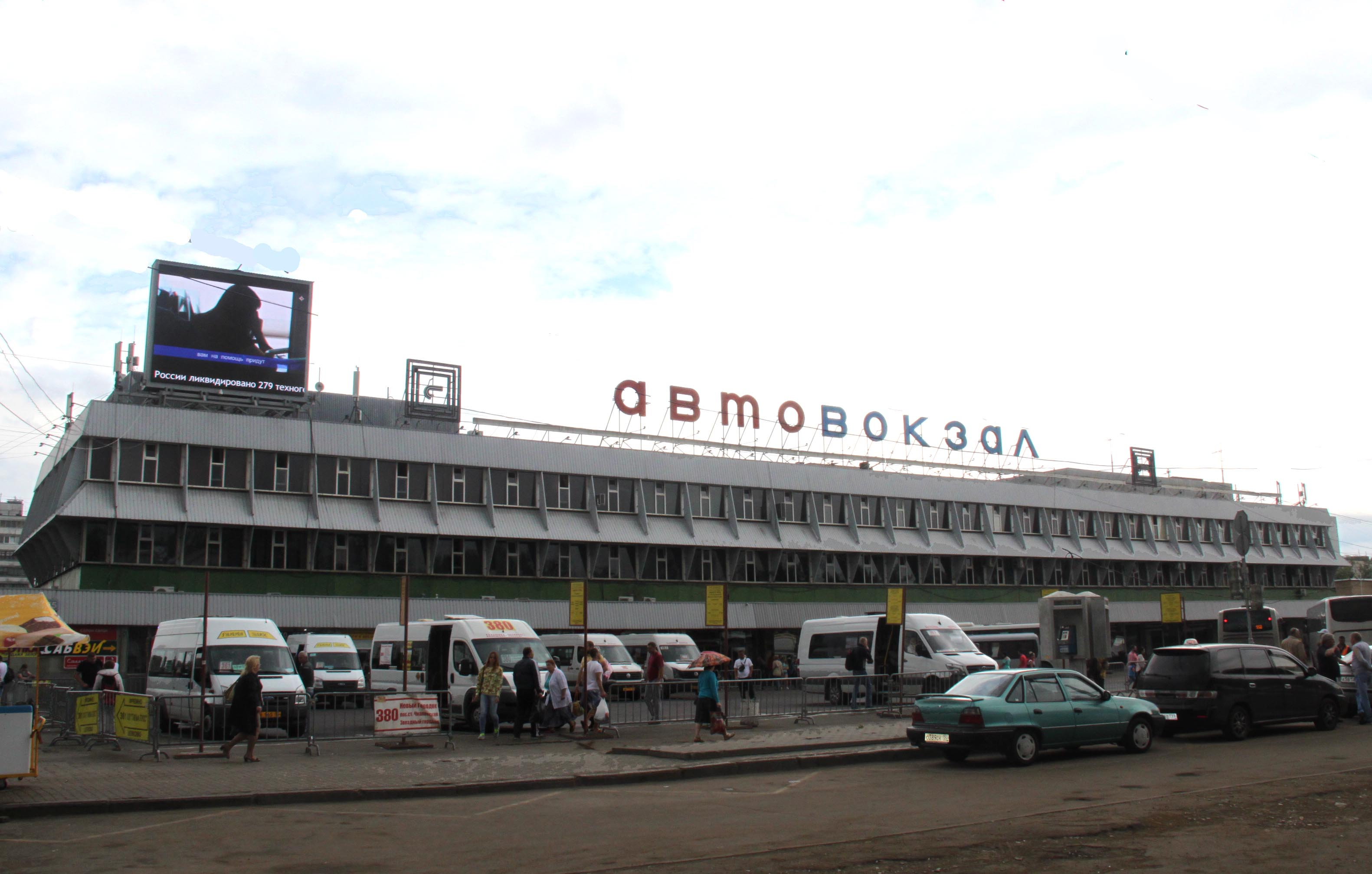 Московский (Центральный или Щёлковский) автобусный вокзал.